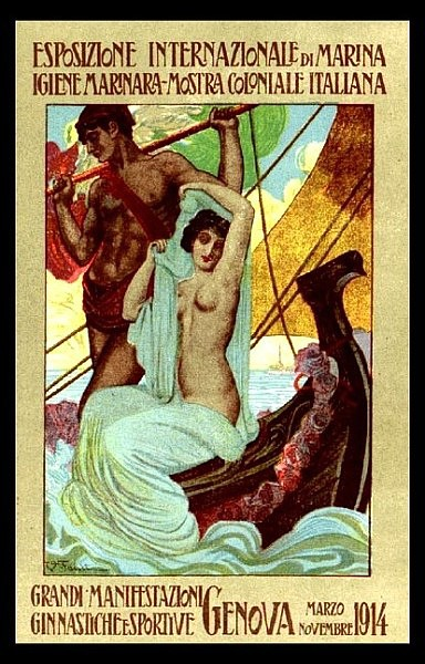 Cartolina pubblicitaria dell'Esposizione d'Igiene, Marina e Colonie, 1914